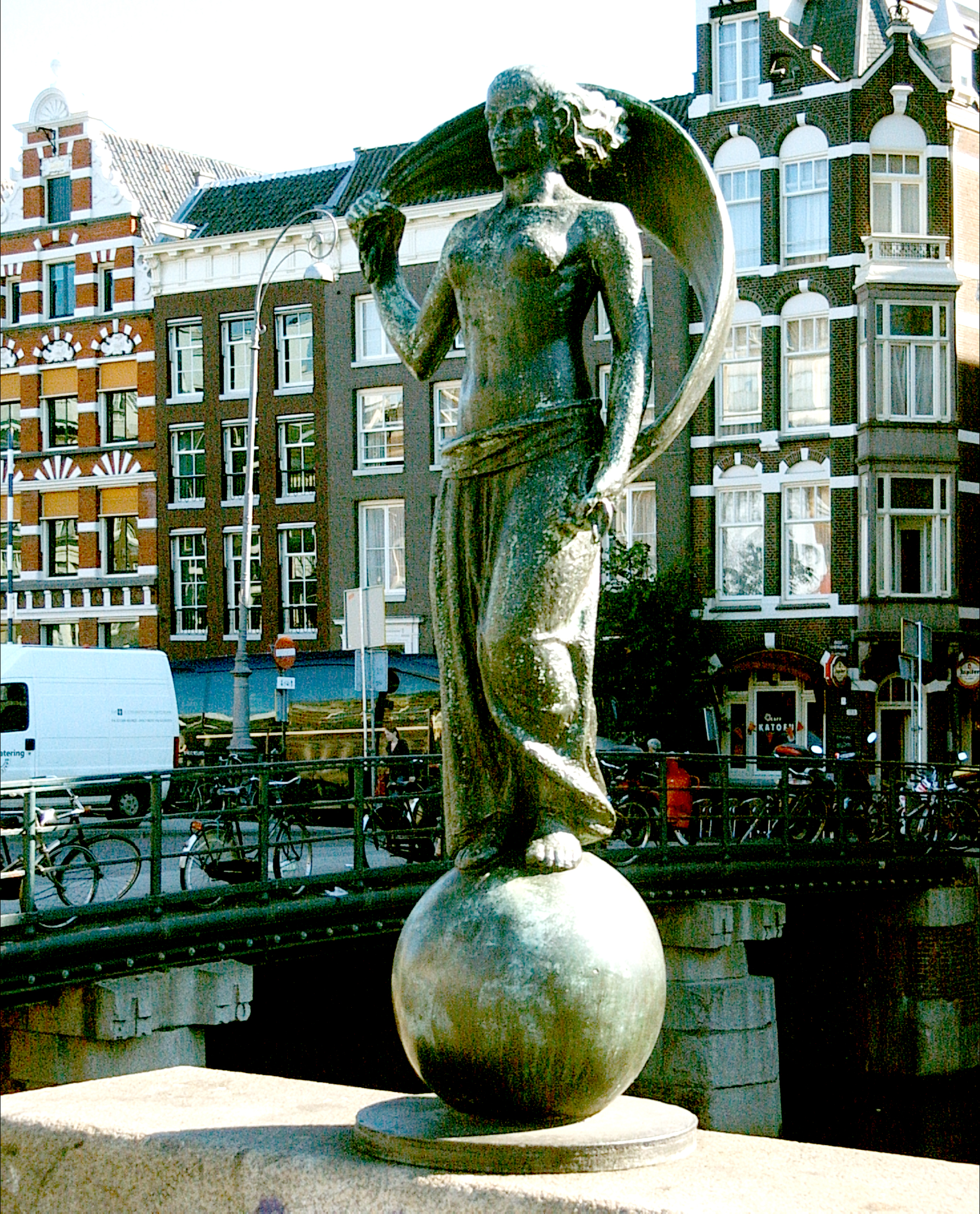 Vrouwe Fortuna op het Muntplein te Amsterdam door Hildo Krop, Brug 220, Doelenbrug op de achtergrond.